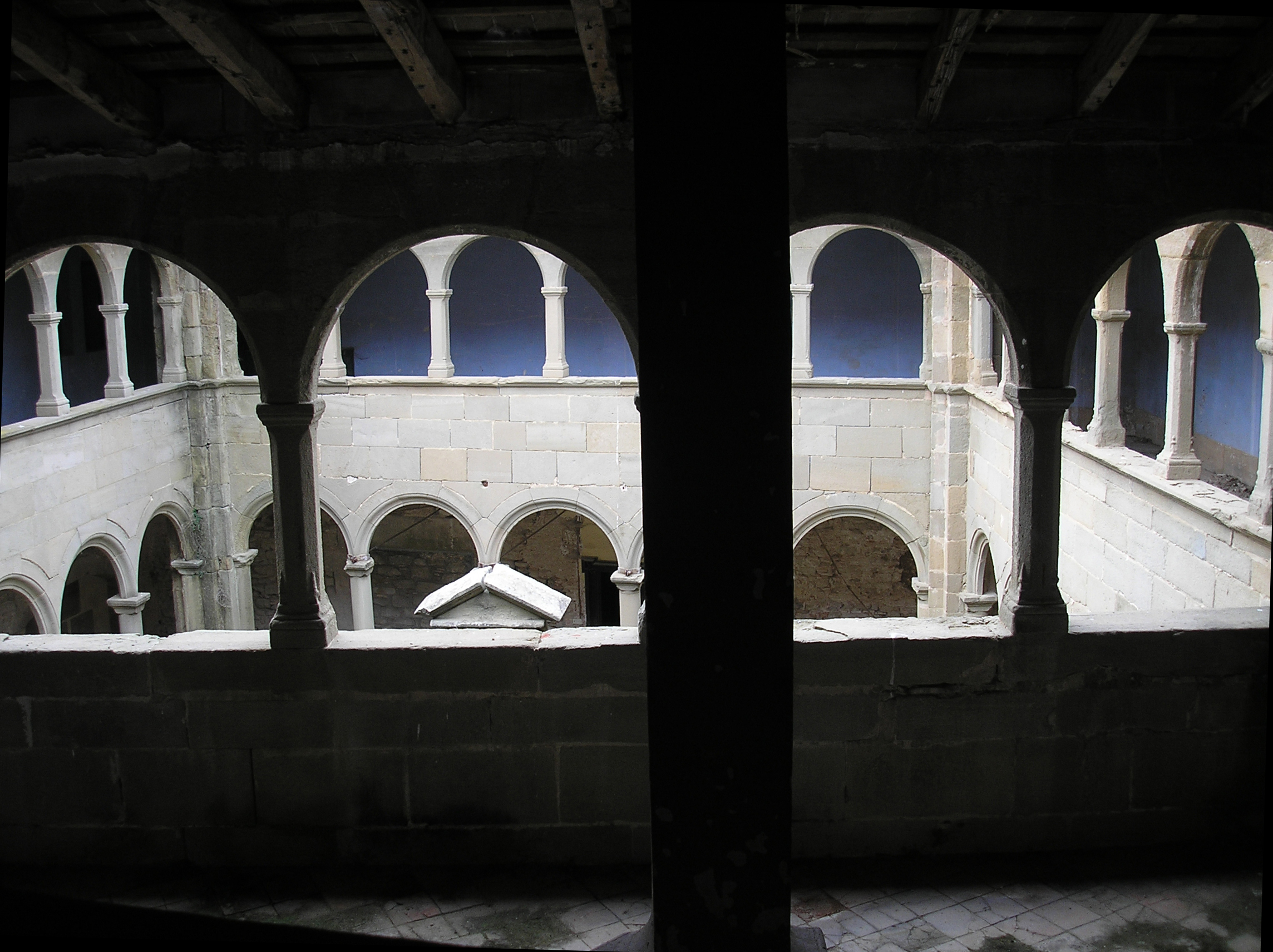 Sant Tomàs de Riudeperes. Antic monestir canonical, fundat amb els esforços de la família dels Riudeperes a finals del segle XI, el 1560 es va convertir en convent franciscà. Entre 1901 i 1970 va ser noviciat i residència dels pares camils. Actualment acull una escola per a disminuïts psíquics. Almenys des del 1045 hi ha documentada una església dedicada a sant Tomàs, situada en un lloc no molt llunyà d'on es va alçar el nou edifici. Des del 1086 els seus clergues vivien en canonicat. El 1095 es va consagrar la nova església. El 1560 el bisbe Jaume Caçador, amb el seu nebot Guillem, van transformar l'antiga canònica en un convent de franciscans observants. En aquella època Sant Tomàs només tenia un atri en el qual hi havia alguns sepulcres antics dels Riudeperes i dels Alta-riba, una casa petita, i un claustre i un hort sense tancar. Les obres van iniciar-se el 1561, fetes en la seva major part pel mestre de cases Guillem Vaxeres.